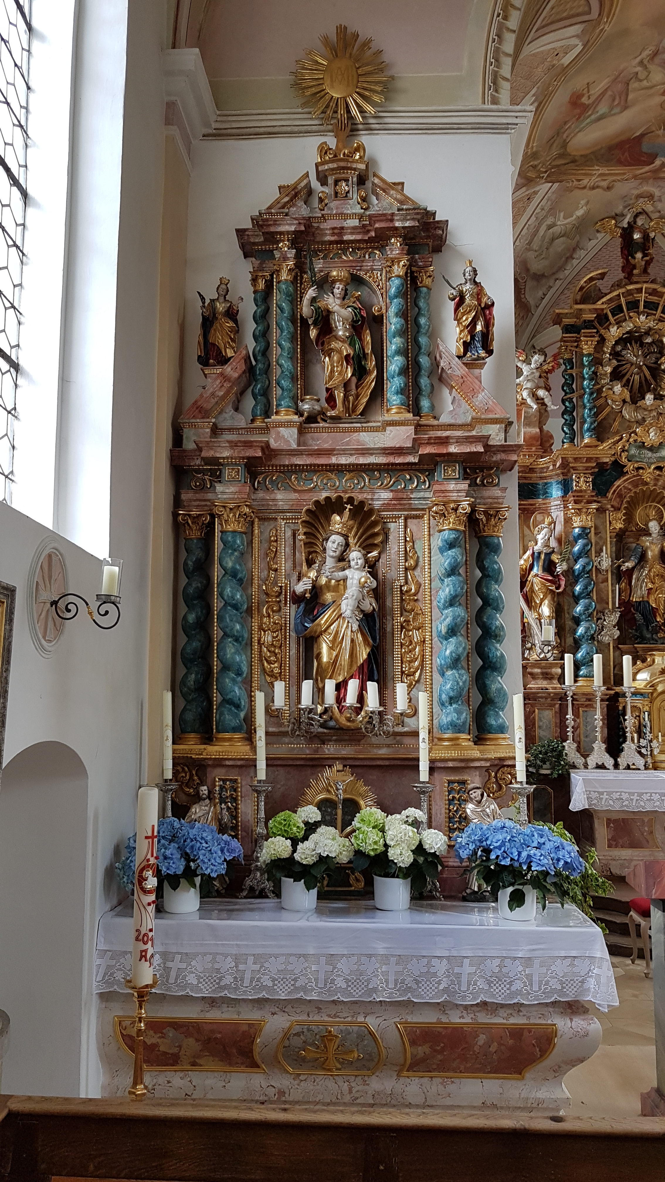 Issing (Vilgertshofen), Pfarrkirche St. Margaretha, linker Seitenaltar (Muttergottes) von 1680/1700.